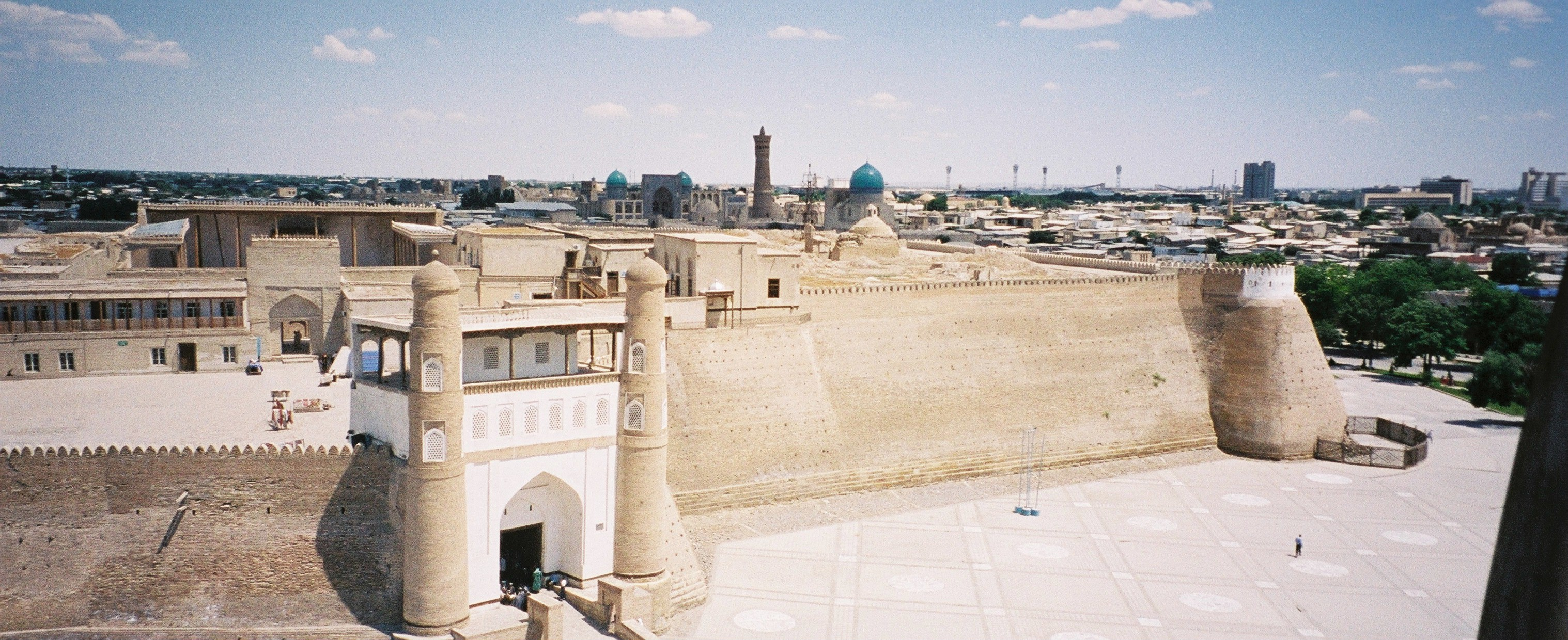 ark / bukhara